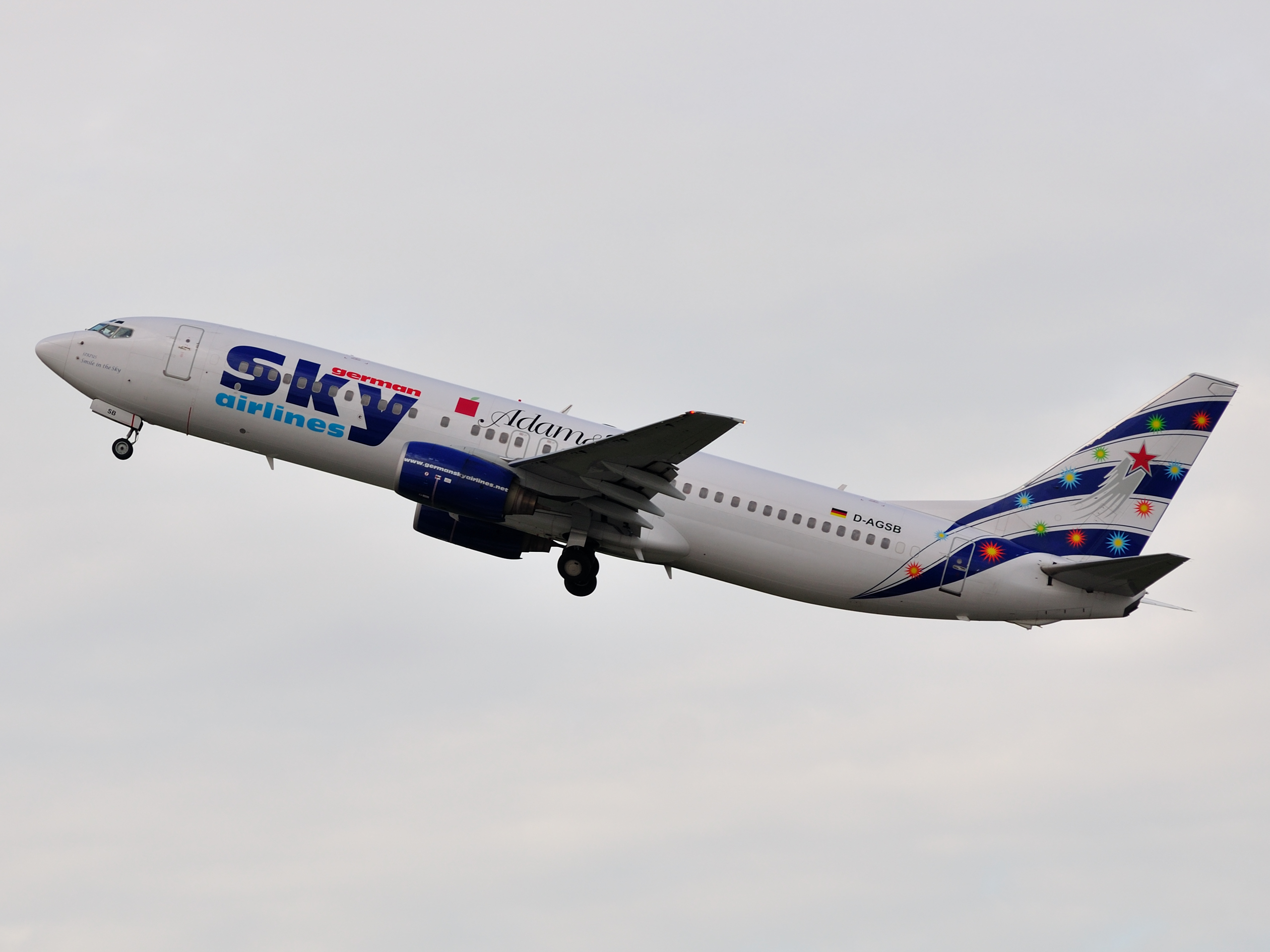 German Sky Airlines B737-800 D-AGSB